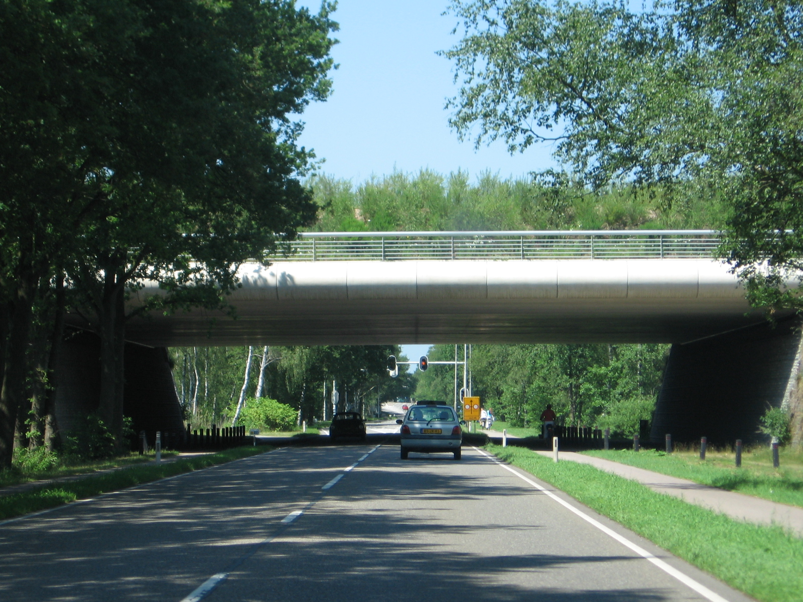 Bussum/Hilversum, aviduct, juni 2006